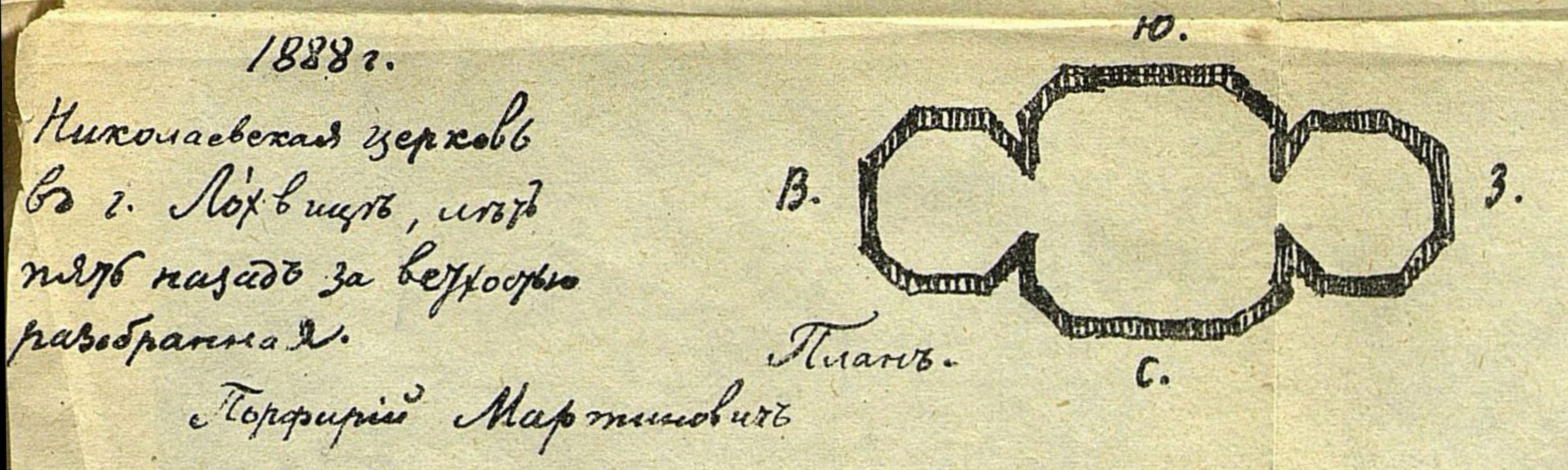 План Миколаївської церкви в м. Лохвиця. Фрагмент малюнку Порфирія Мартиновича. Підпис на малюнку (рос.): "1888 г. Николаевская церковь в г. Лохвица, лет пять назад за ветхостью разобрана. Порфирий Мартынович".